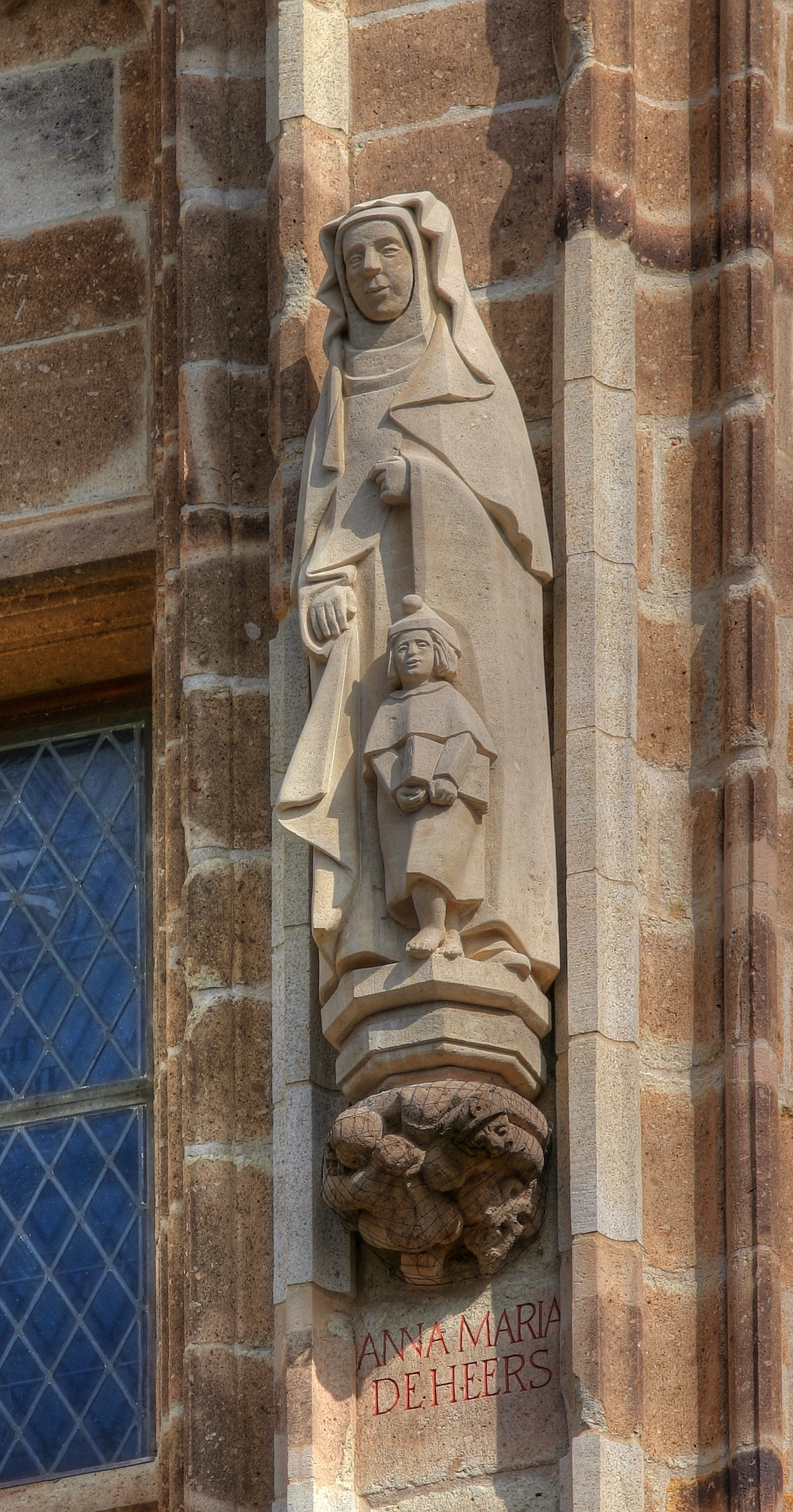 Rathausturm Köln mit der Figur der Anna Maria de Heers. Bildhauer: Paul Nagel